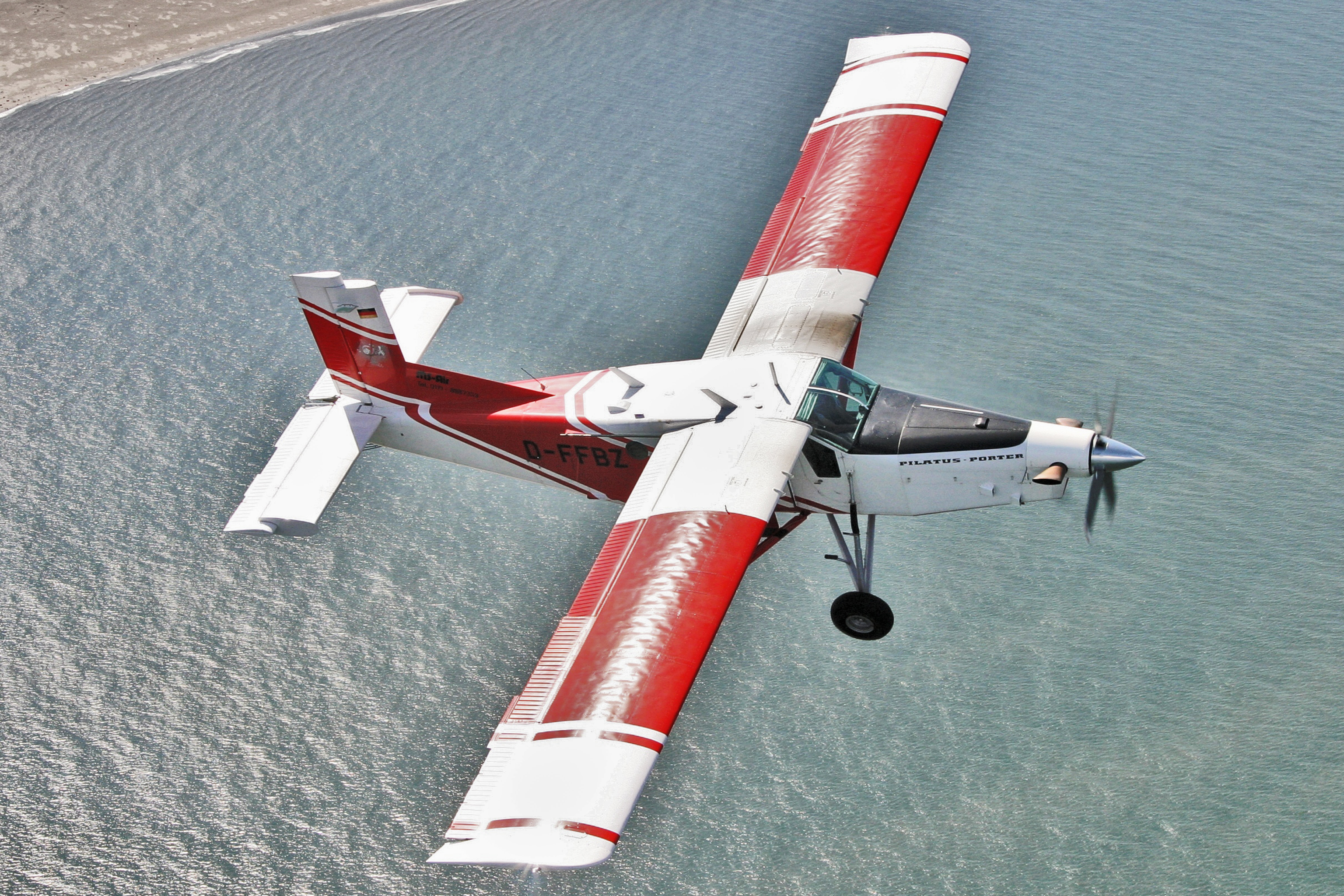 Pilatus PC- B2H4 S/N 869 Baujahr 1990 im Flug